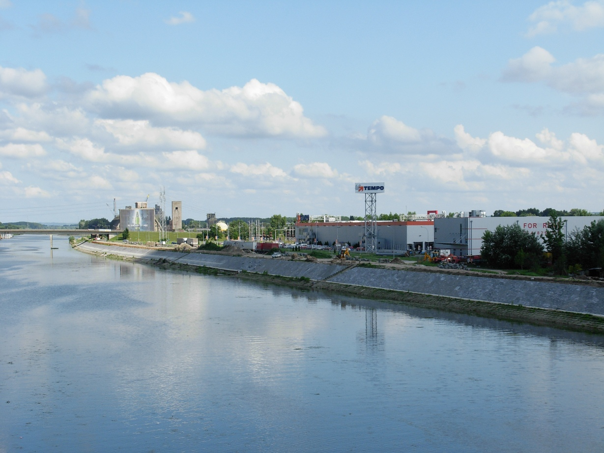 Kanal DTD u Novom Sadu. Pogled na Tempo sa Temerinskog mosta.